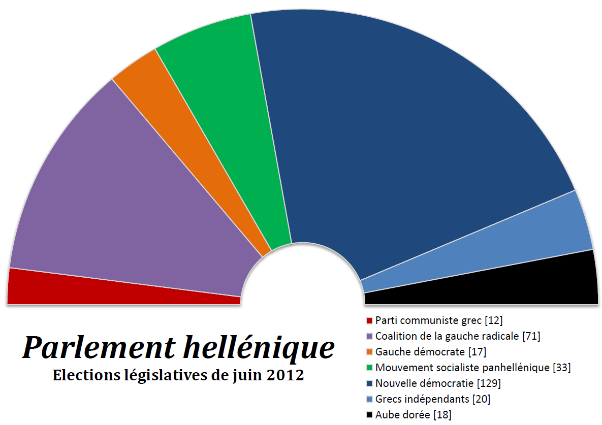 Composition politique du Parlement hellénique après les élections législatives du 17 juin 2012